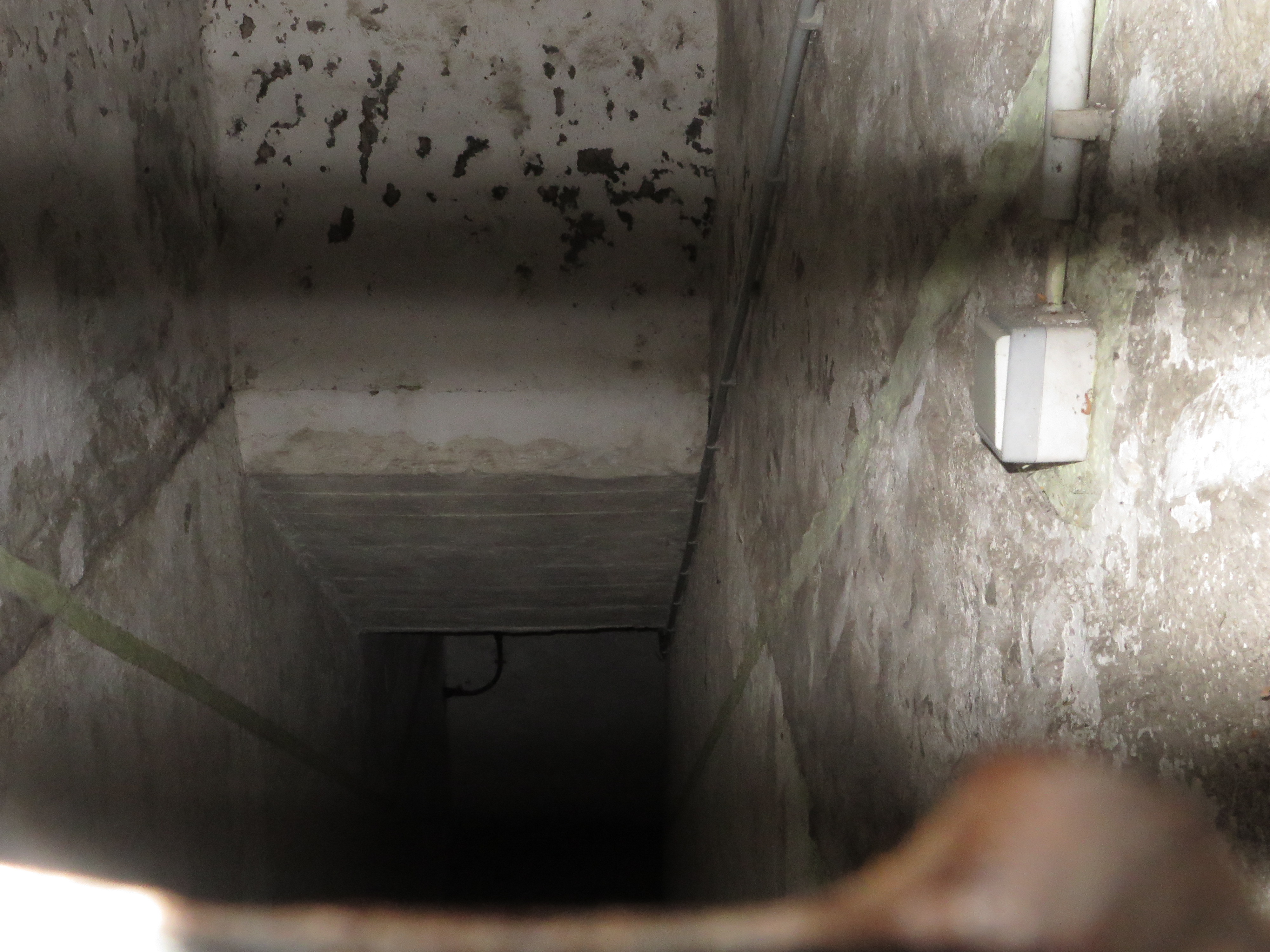 Einstieg zum unterirdischen Bunker beim Turnierplatz, Flensburg, Bild 001